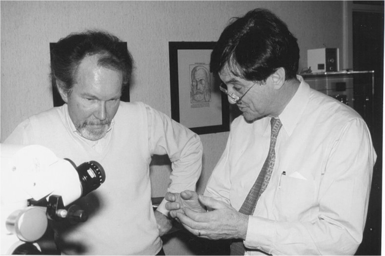 에카르트 슈뢰더 박사와 스티븐 트로켈 박사의 공동 연구